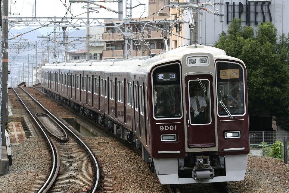 阪急電鉄宝塚線用9000系。神戸線用とは特に差異は無い。阪急電鉄宝塚線石橋駅にて。